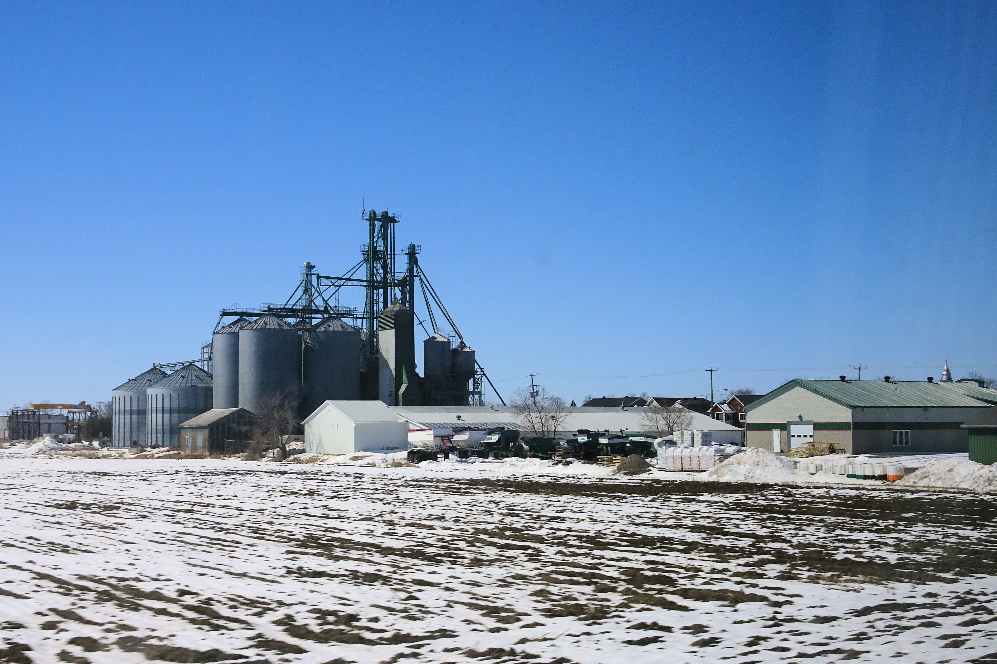 Saint-Polycarpe, Quebec, Canada